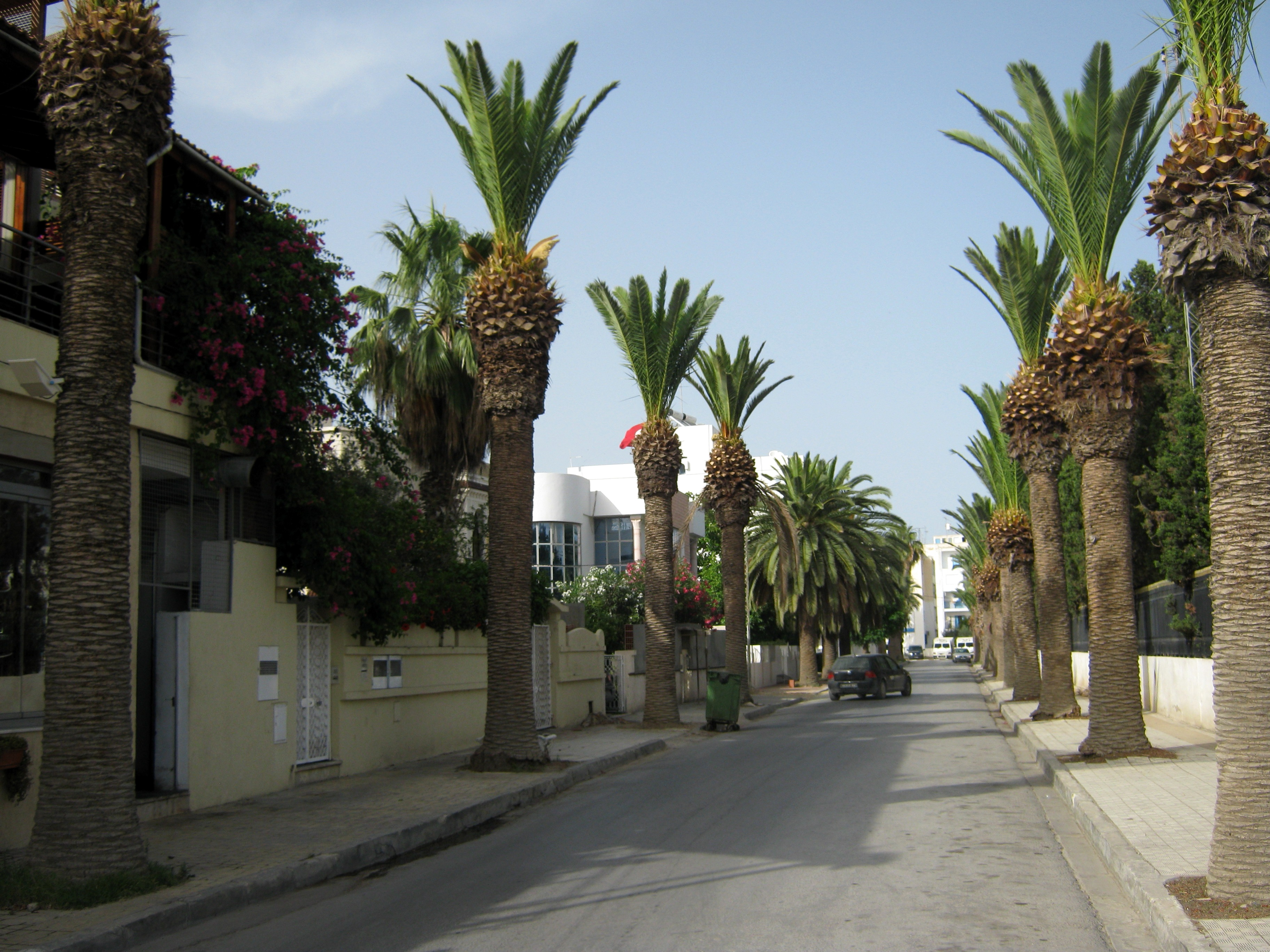 Аллея пальм в Набуле